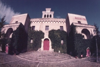 Il Castello di Rende (CS), sede del Municipio (Foto di Luigino)